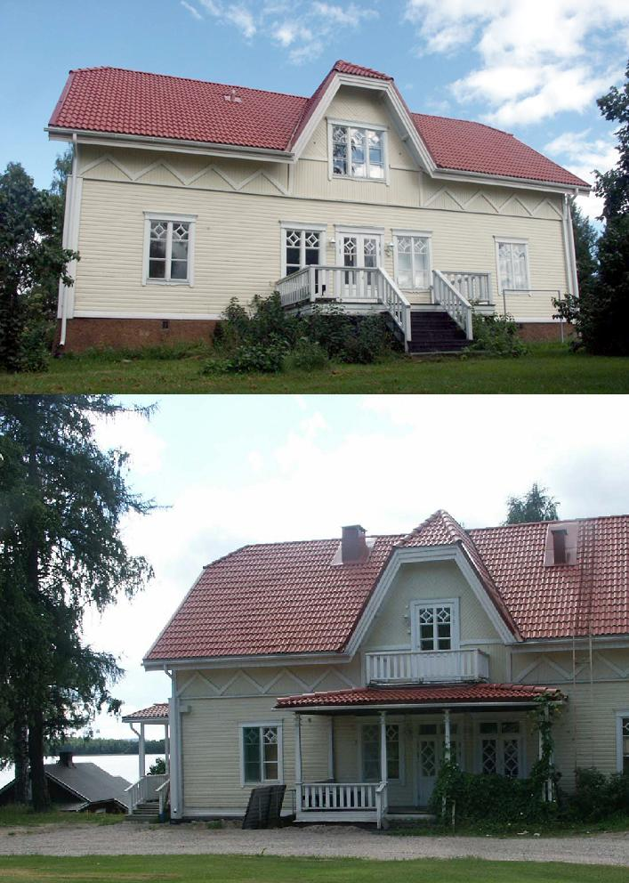 Wolmar Schildtin syntymäkotitalo Laukaan Pernasaaressa, kuvan otti Anssi vuonna 2004. Talo rakennettu 1806 ja korotettu myöhemmin kaksikerroksiseksi. Seinälle asennettiin muistolaatta Kukan päivänä 2005 (Yliopistomuseo, Laukaan vankila ja Wanhan Laukaan kotiseutuyhdistys).